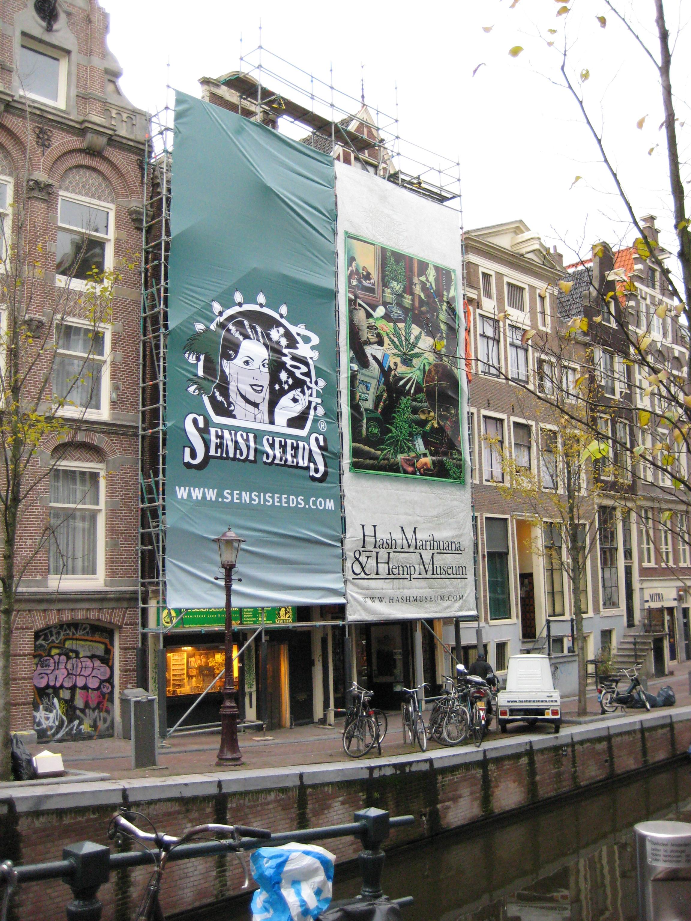 Hash Museum in Amsterdam